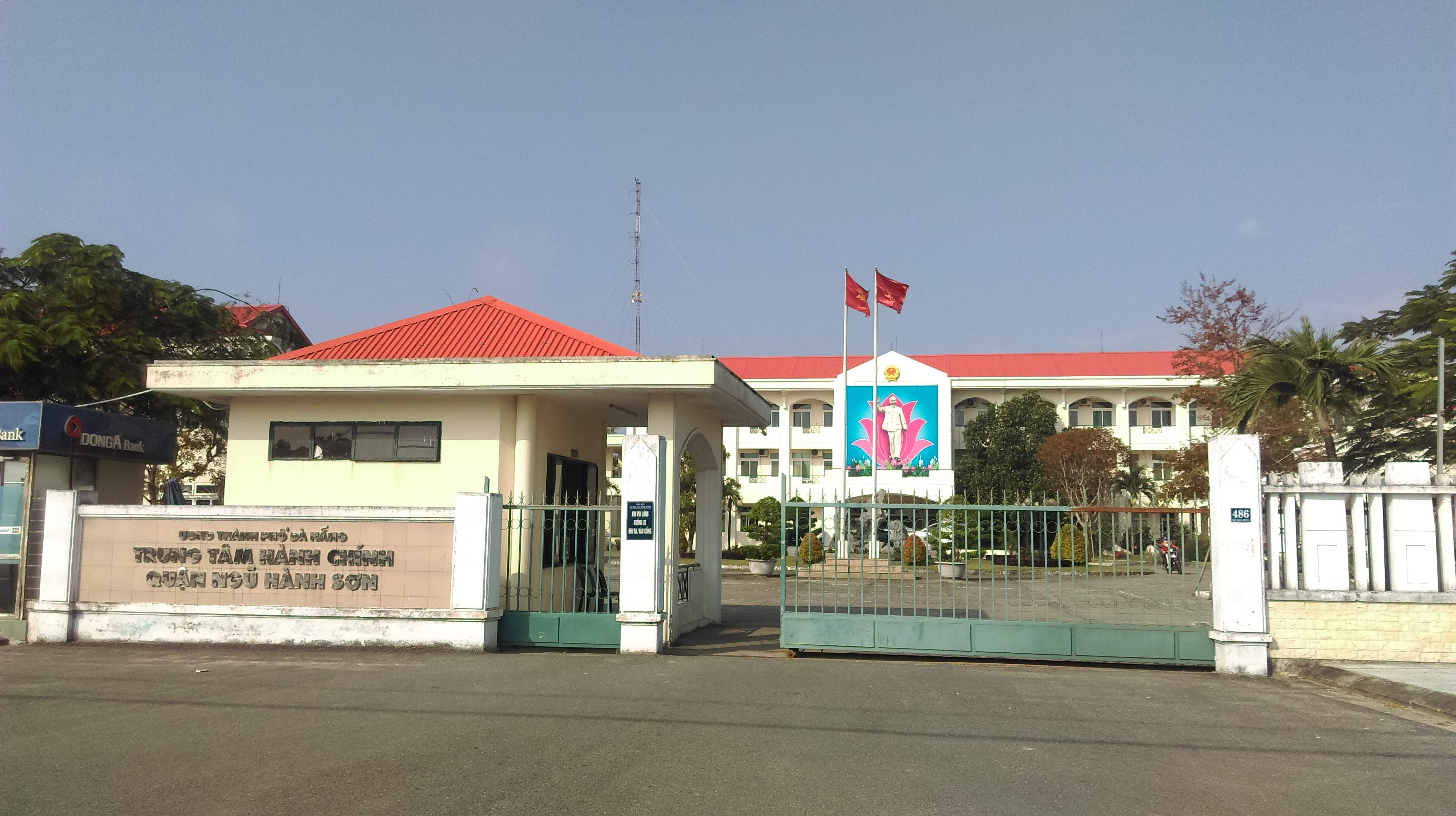 Trung tâm Hành chính quận Ngũ Hành Sơn